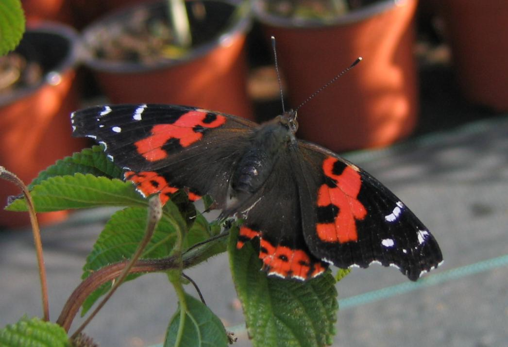 Kanarischer Admiral (Vanessa vulcania (Godard, 1819)), Teneriffa, Nordküste, Nähe Puerto de la Cruz